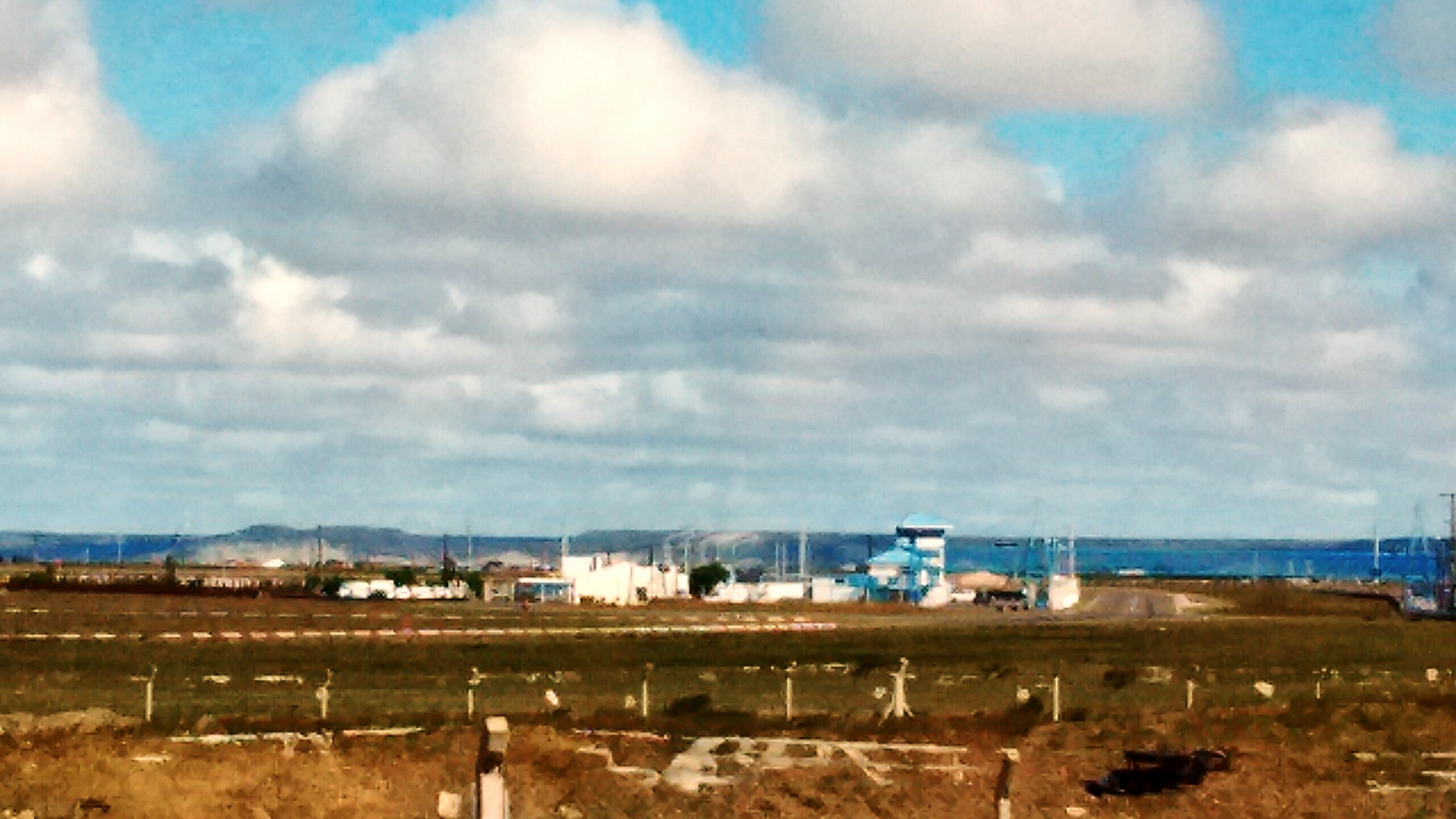 Instalaciones desde la ruta